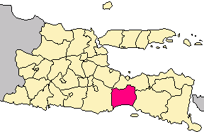 carte indonésienne